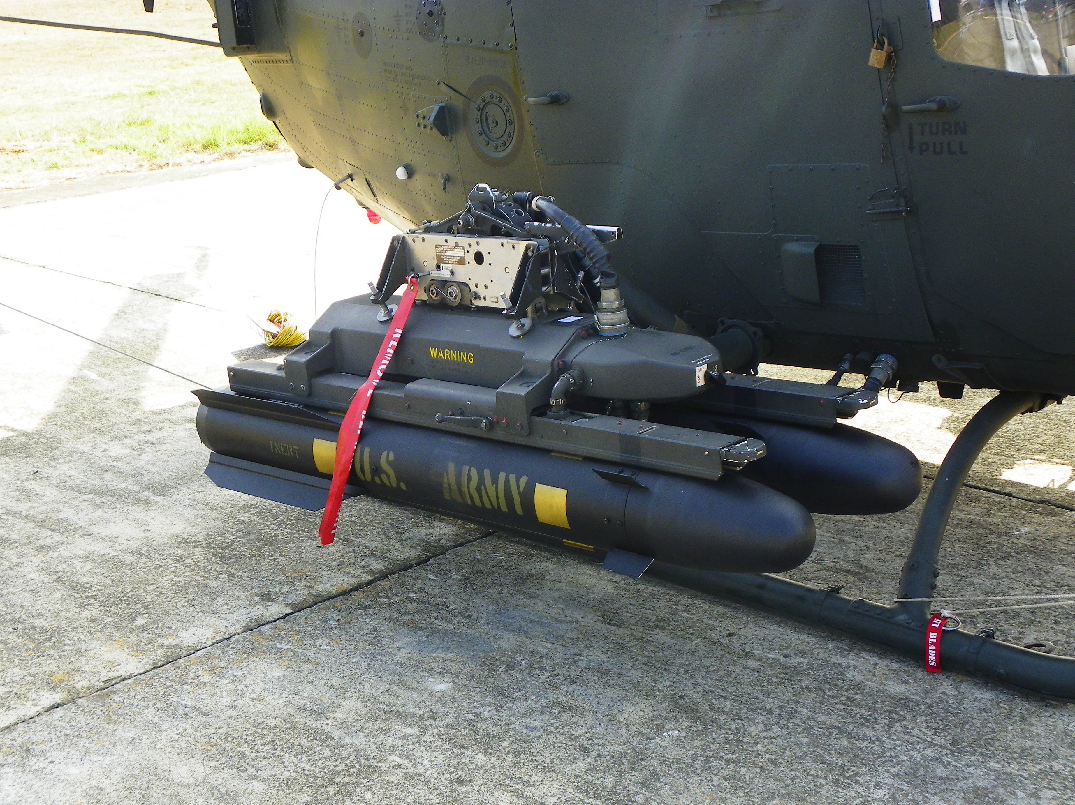 兩枚搭載於中華民國陸軍OH-58D右側掛架的AGM-114地獄火飛彈，攝於2011年陸軍湖口營區開放活動。